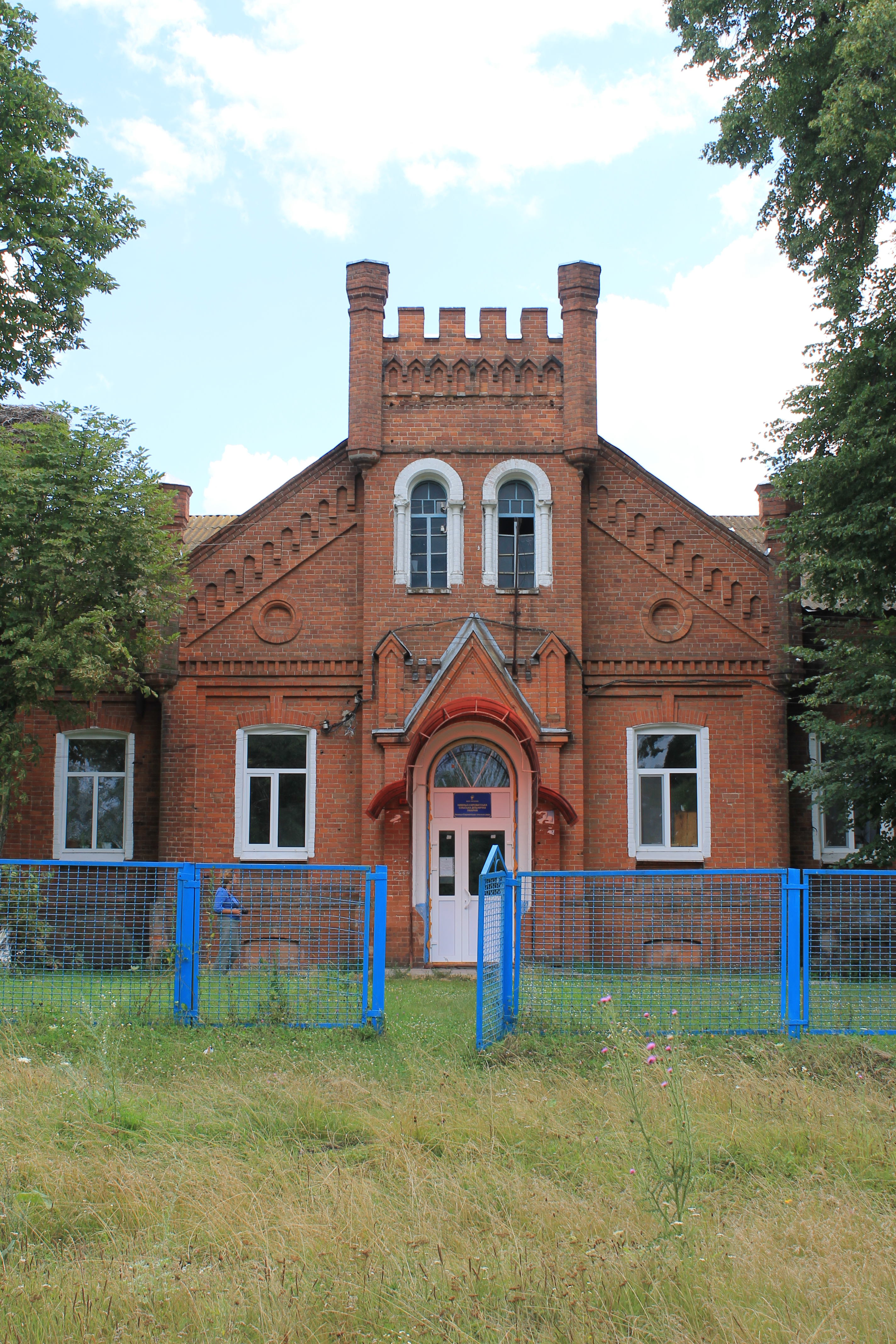 Богадільня, Сумський район, с. Нижня Сироватка